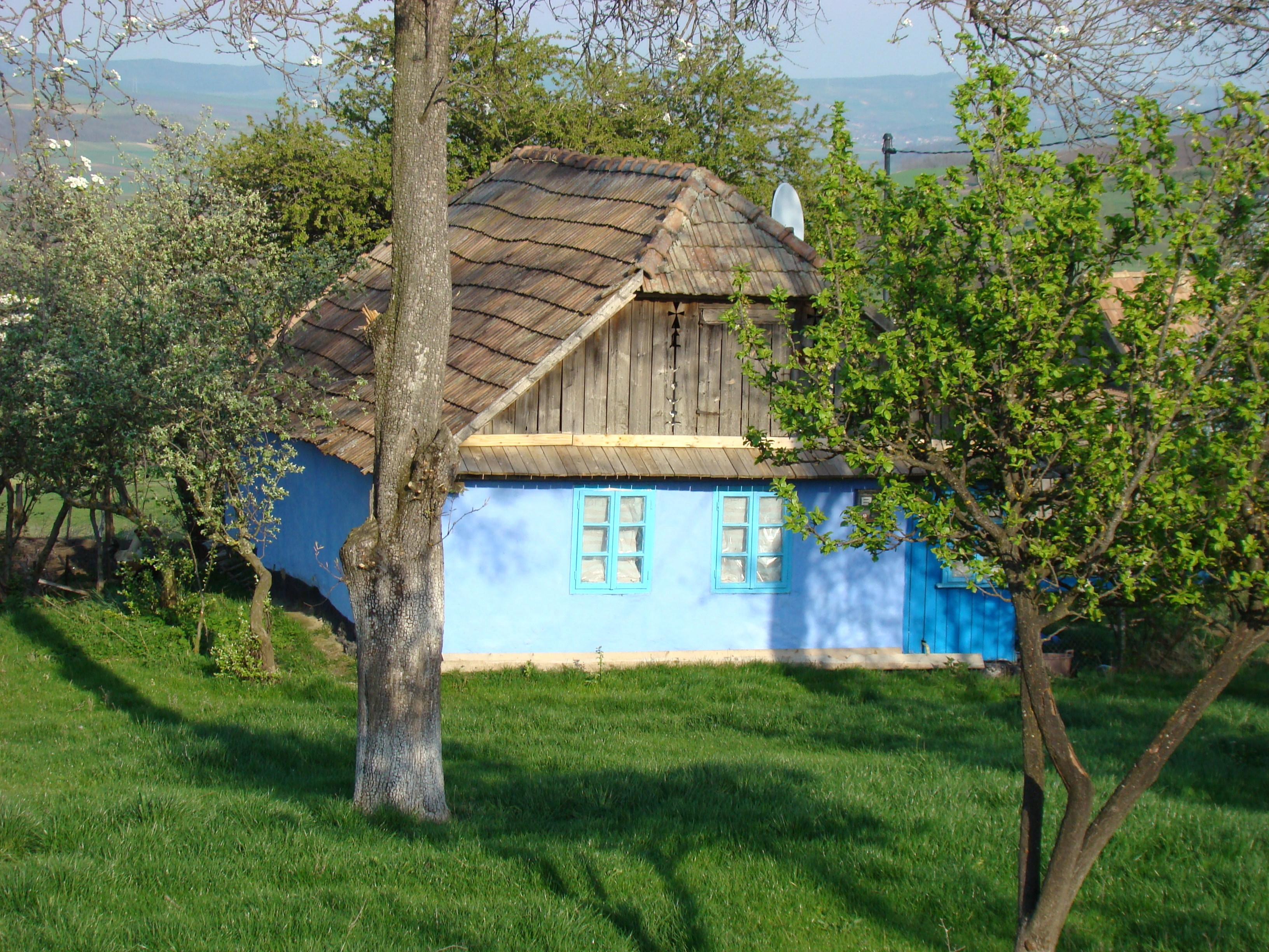 Casa scriitorului Dan Pavel din satul Clapa, comuna Tritenii de Jos, județul Cluj